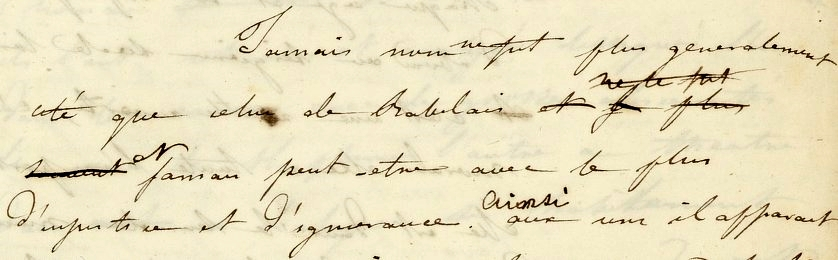 Tiré des œuvres de jeunesse de Flaubert, (1re série). XVI Étude sur Rabelais.